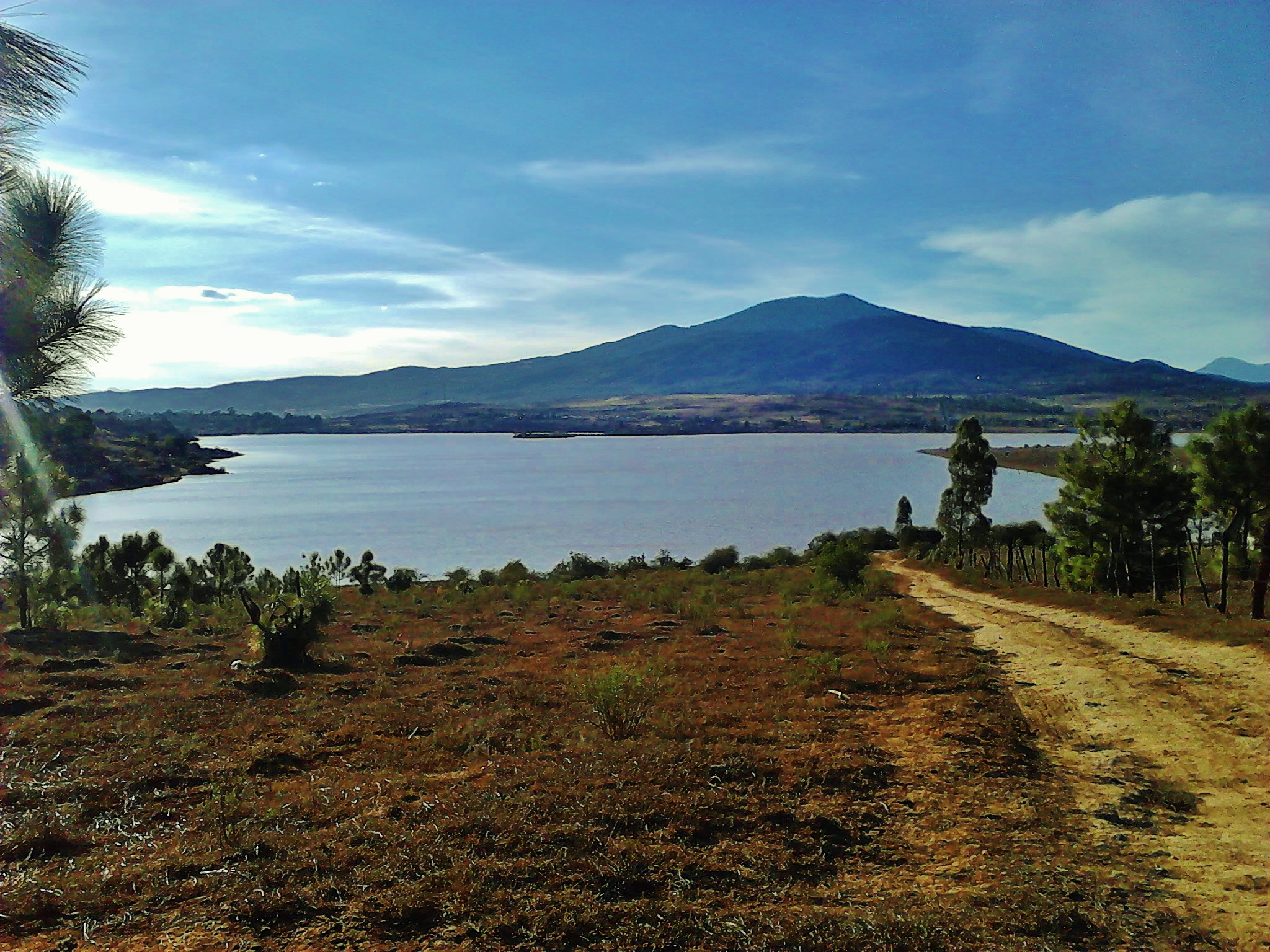 Presa de Cointzio y cerro del Aguila